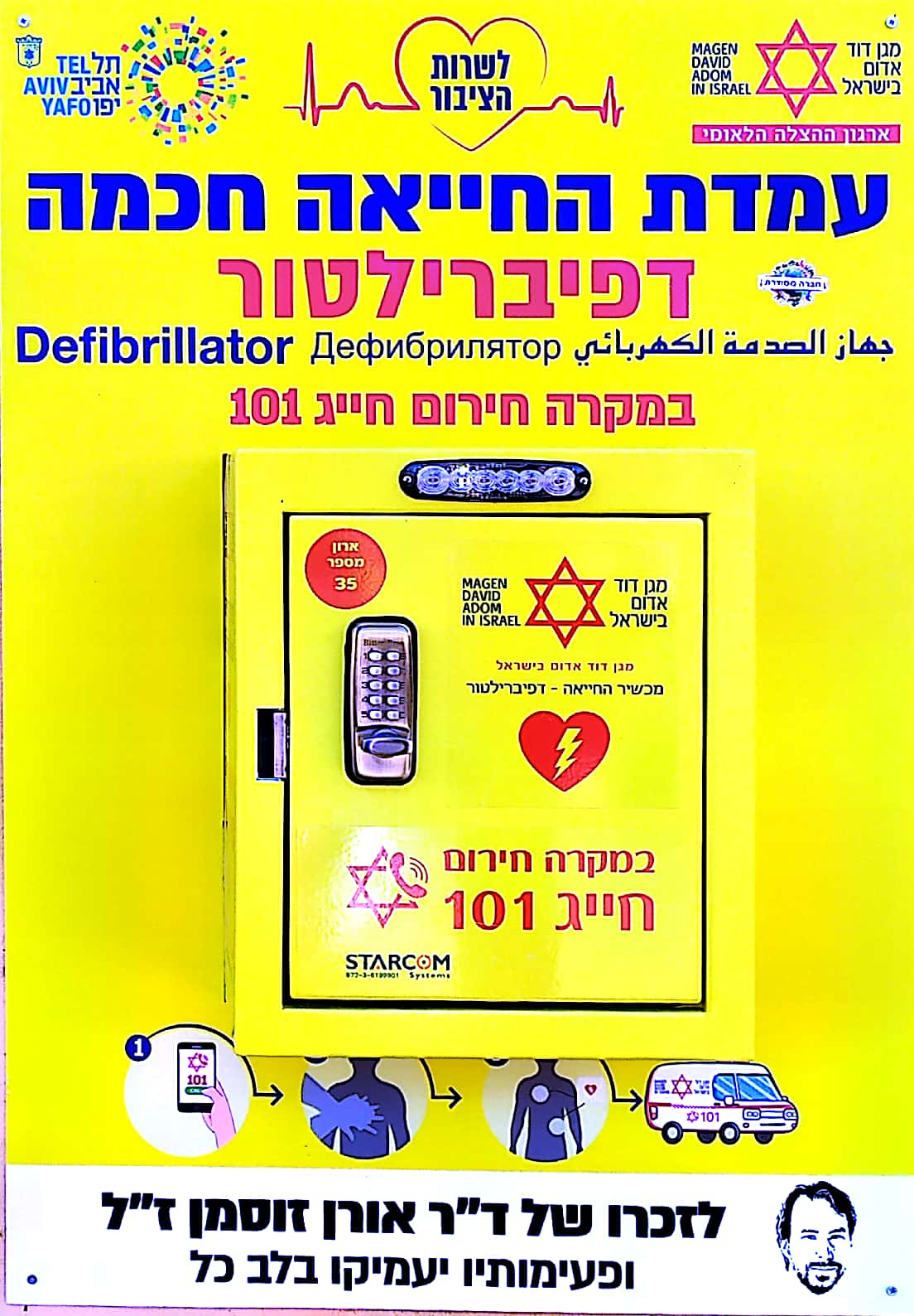 המכשיר מוצב ביפו בשוק עמיעד ברחוב עמיעד. לשמירה על העמדה הציוד נעול עם קוד. בשיחת טלפון עם מד"א ניתן לפתוח את הדלת